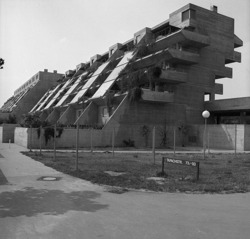 Stuttgart Demonstrativbauvorhaben, Hügelhaus an der Tapachstraße